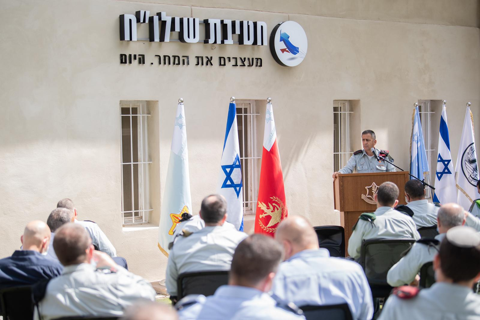 חטיבה חדשה באגף התכנון, חטיבת שיטות לחימה וחדשנות (שילו"ח) לפורום המטה הכללי.